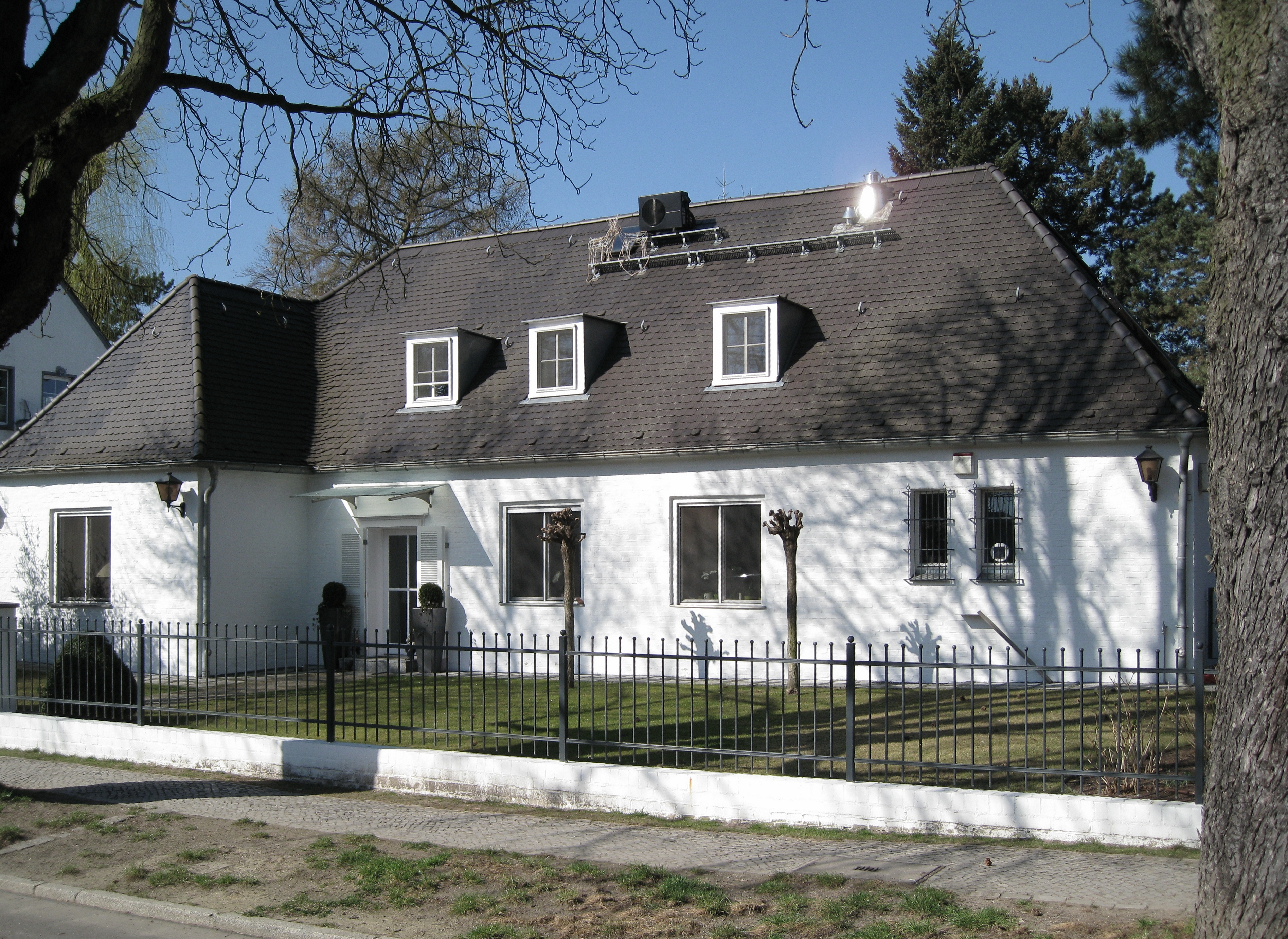 Wohnhaus